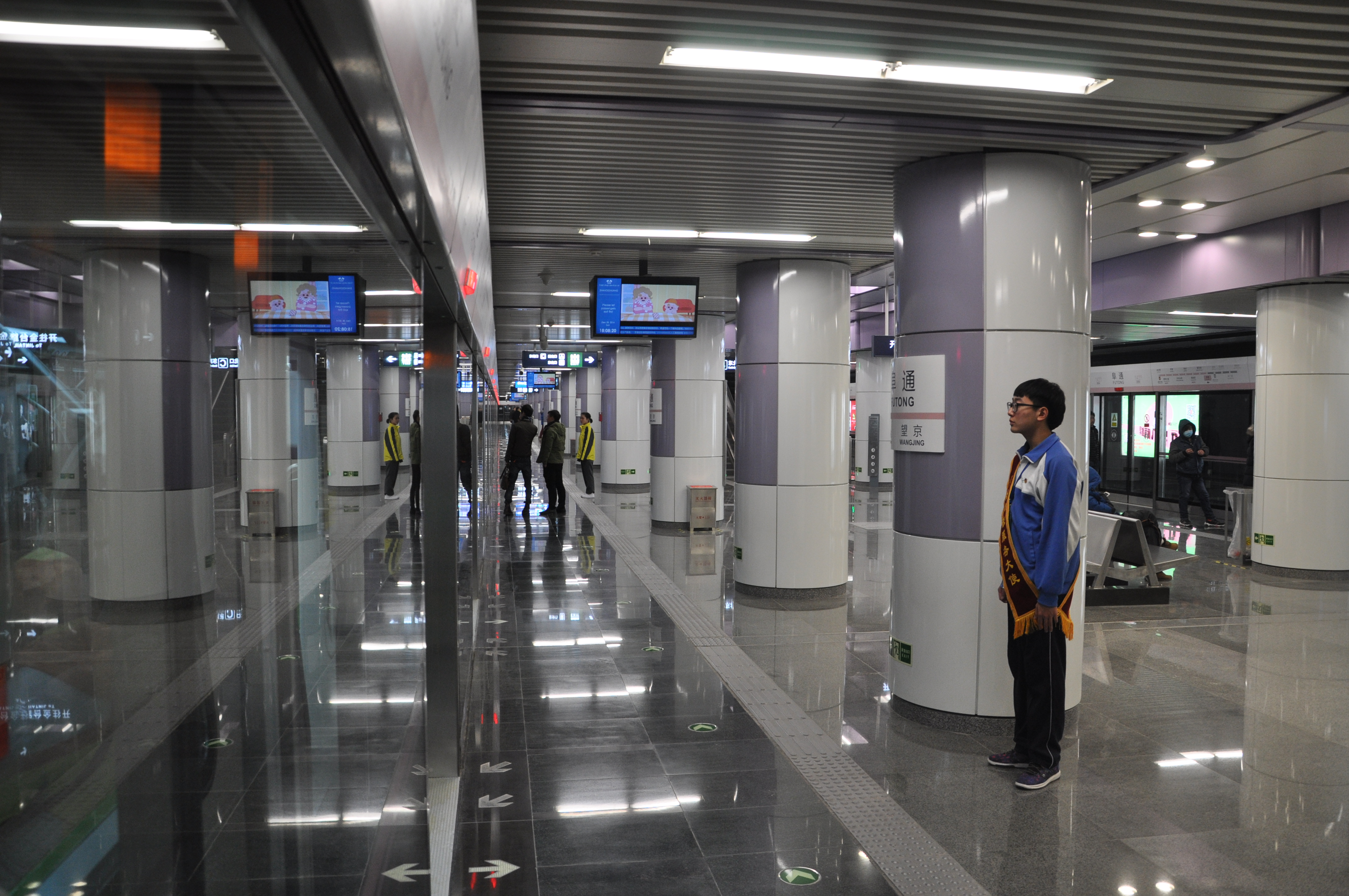 北京地铁14号线阜通站站台